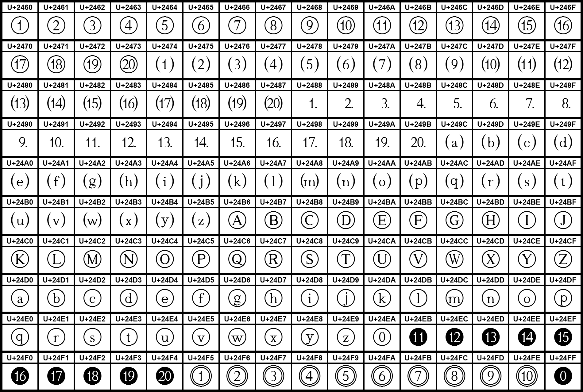 Grafiktafel für den Unicodeblock Umschlossene alphanumerische Zeichen.